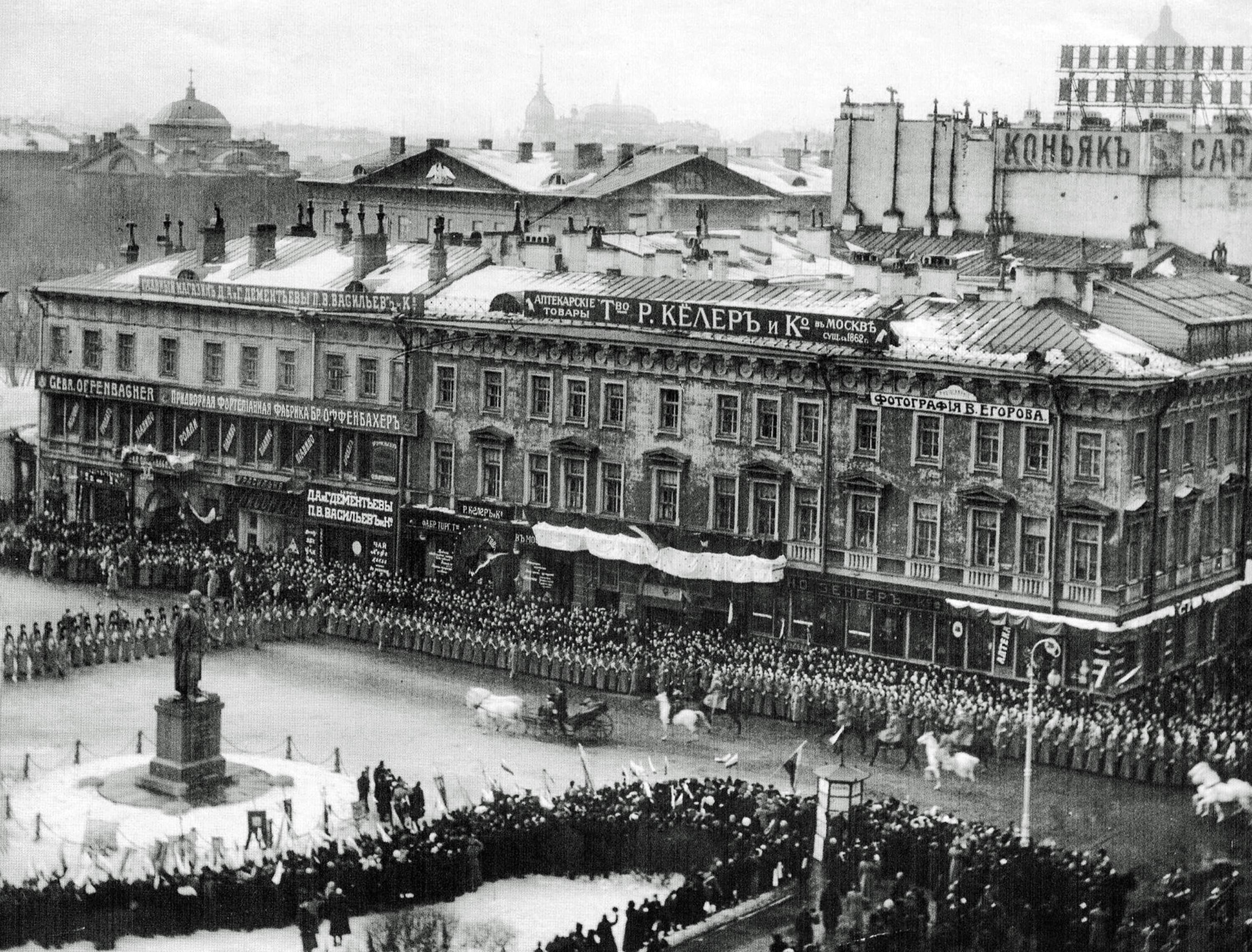 Невский проспект дом 25. Фото Карла Буллы. Церемония празднования 300-летия Дома Романовых.